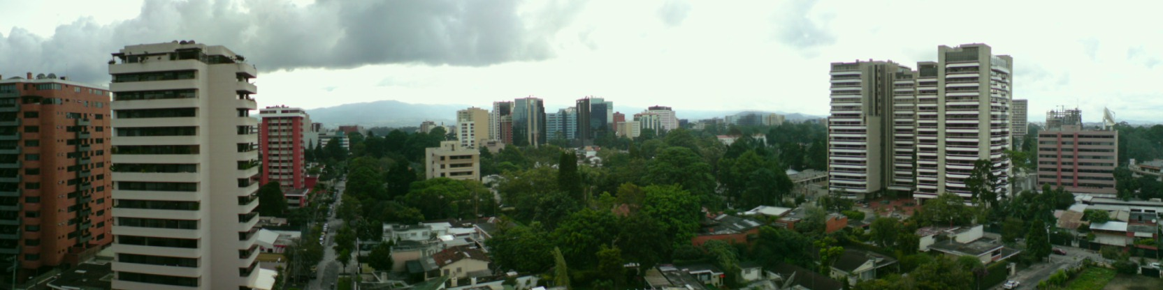 foto de guatemala panoramica